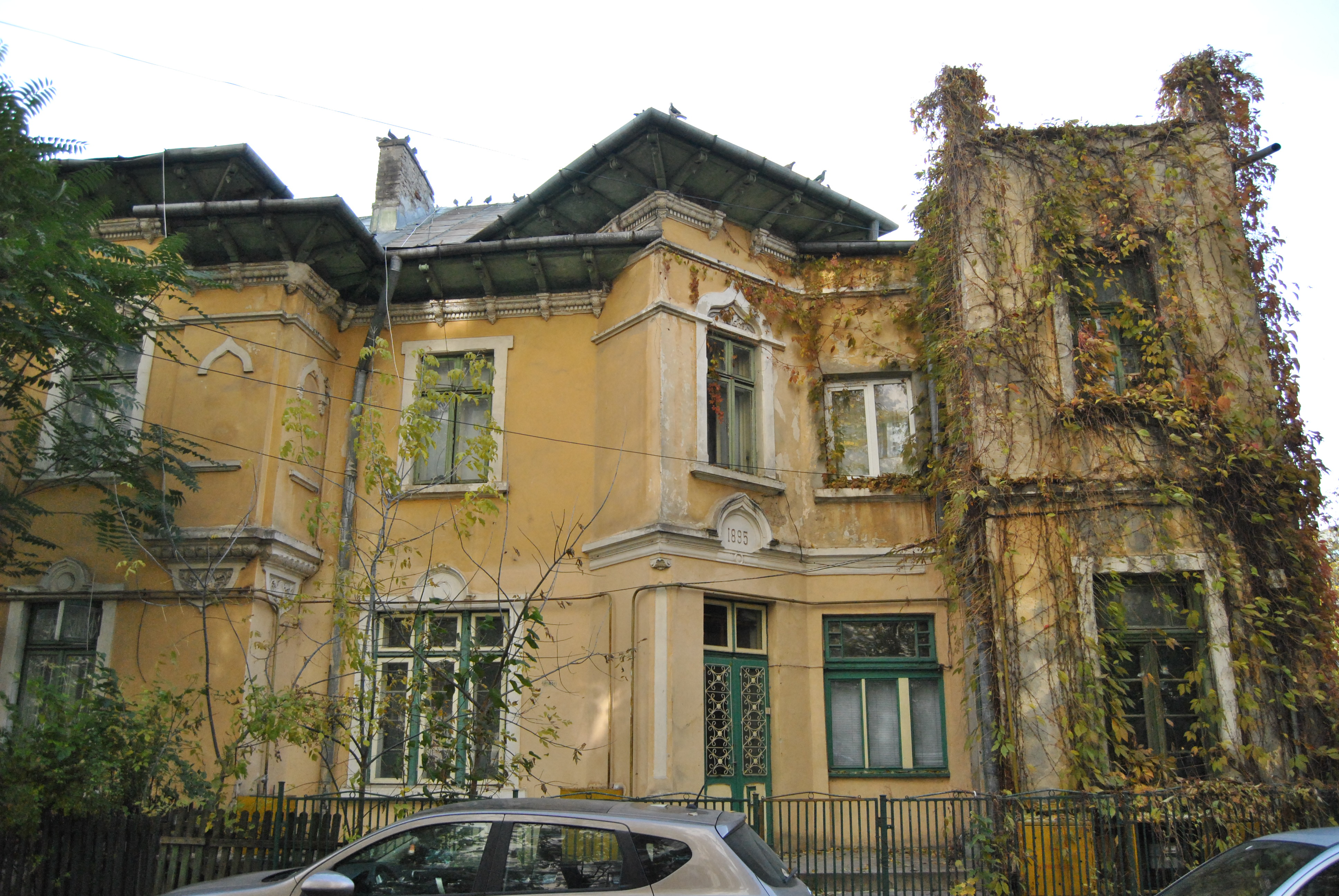 Casă, Str. Titu Maiorescu nr.1